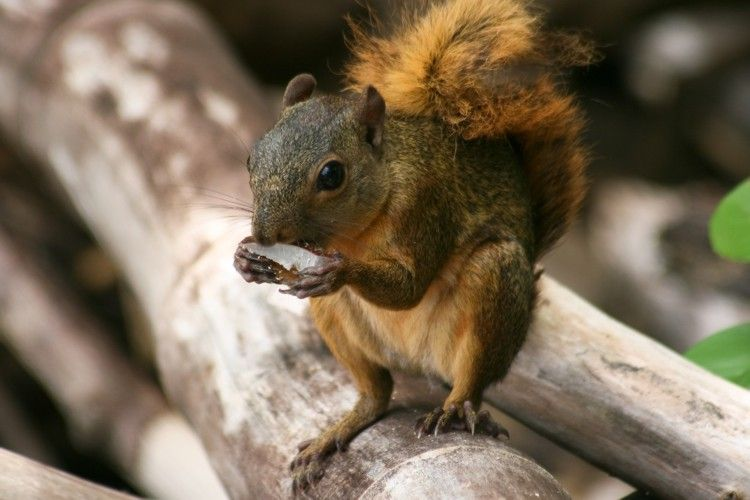 Sciurus granatensis, Humboldt, 1811; Reserva Silvestre Gandoca-Manzanillo, Costa Rica (Costa Rica)